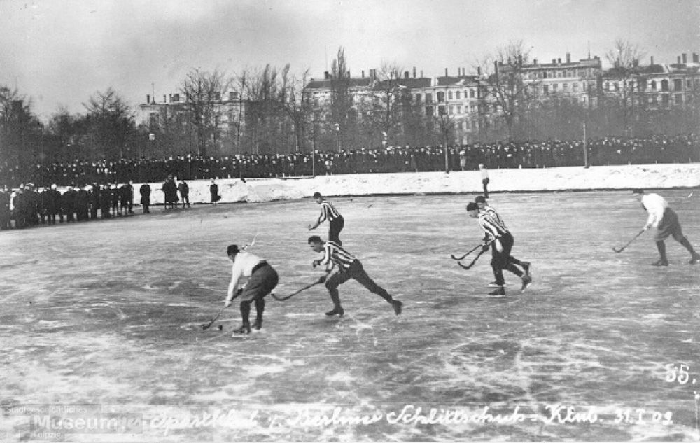 Eishockeyspiel LSC - Berliner Schlittschuh-Klub auf dem Albertparkteich in Leipzig am 31. Januar 1909